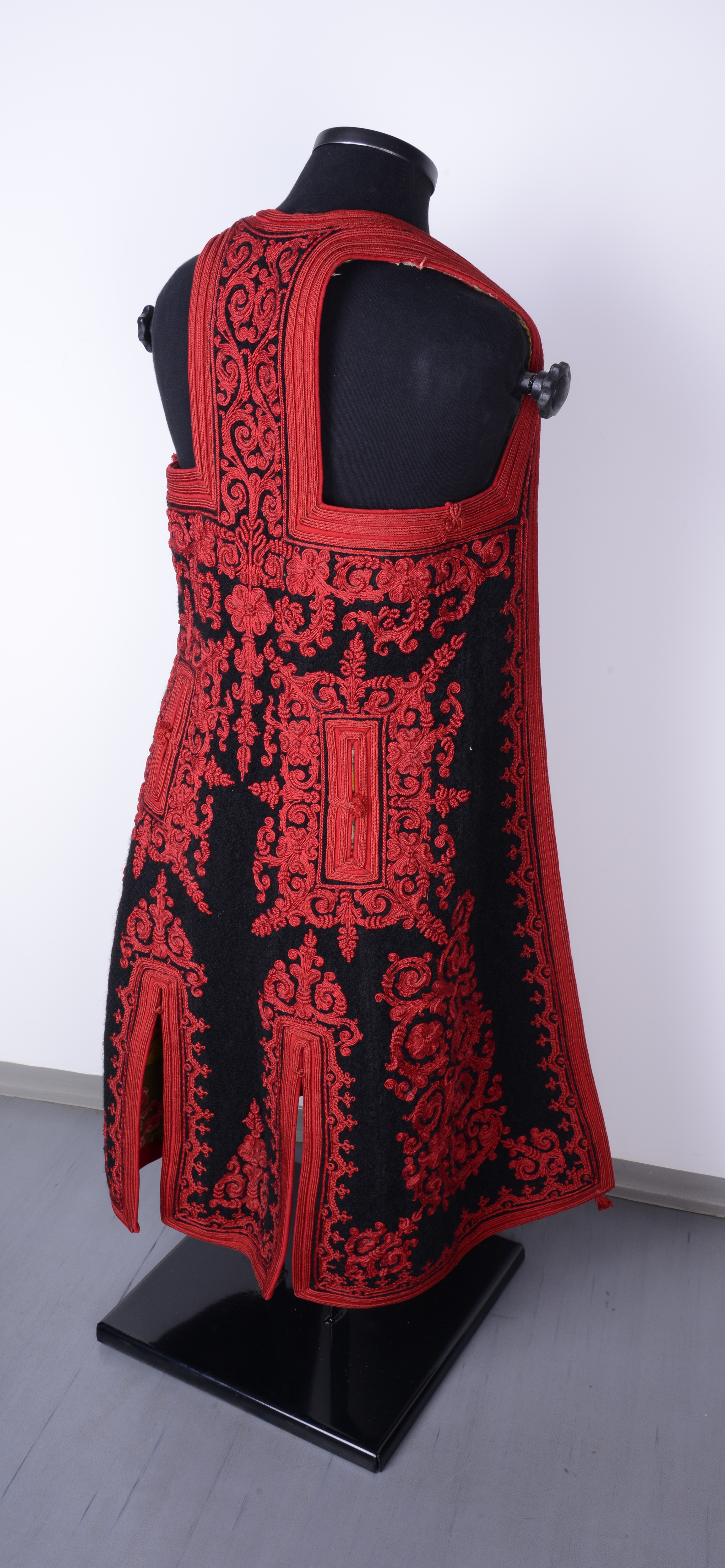 Srpski (latinica): Zubun iz XX veka. Otkup od Lj. Milenkovića iz Leskovca 1960. godine. Izrađen je od tekstila, čoje i vune, tkan i predstavlja rad majstora terzije. Grčki zubun je rađen na crnom suknu tj. čoji, a ornamenti na njemu rađeni su od crvenog gajtana sa stilizacijom floralnih i geometrijskih motiva. Na prednjem delu je kopčanje dok na zadnjem ima dva proreza. Zubun je nošen uz srpsku nošnju. Deo je zbirke tekstila Narodnog muzeja u Leskovcu.